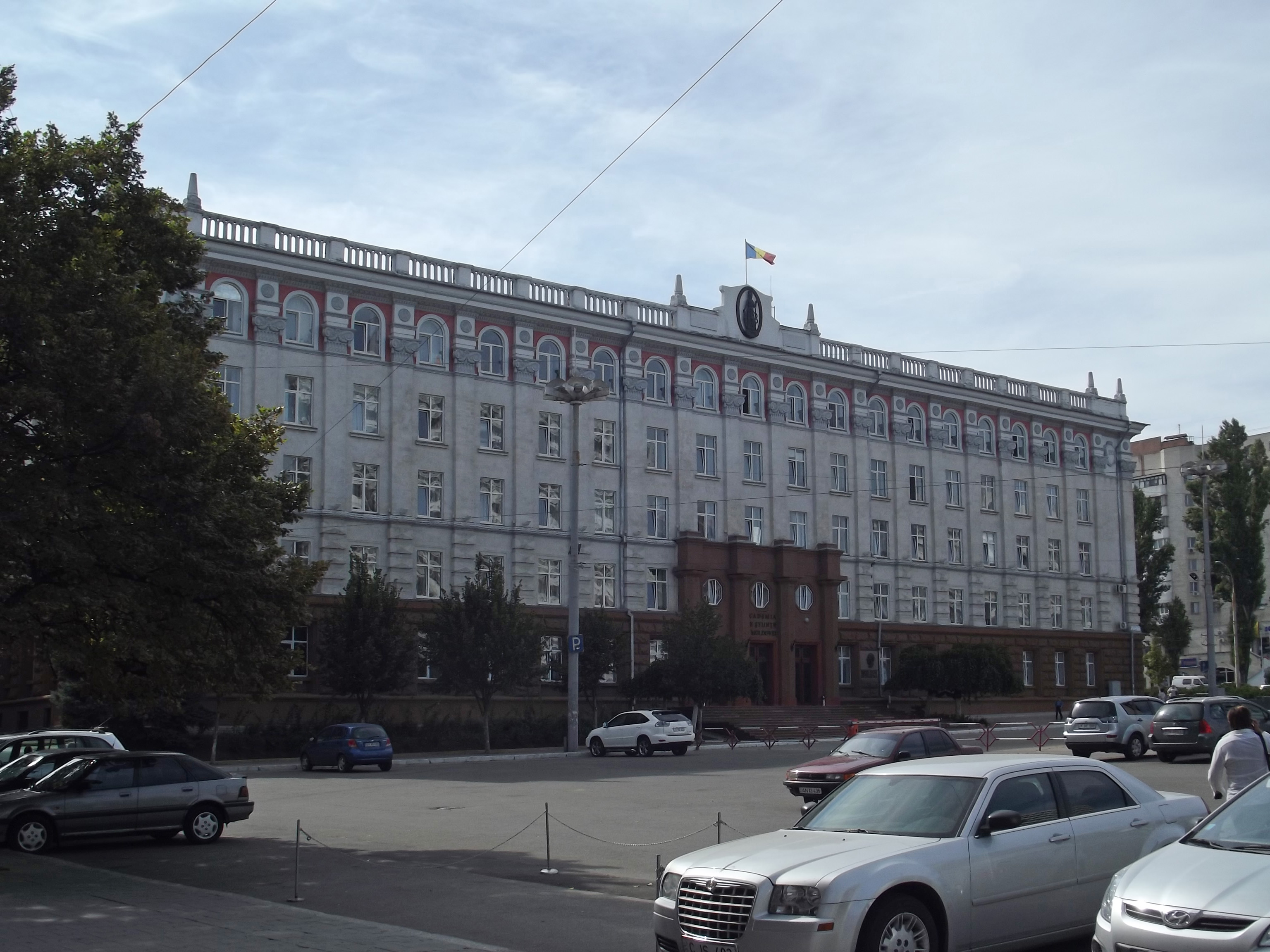 Здание Академии Наук